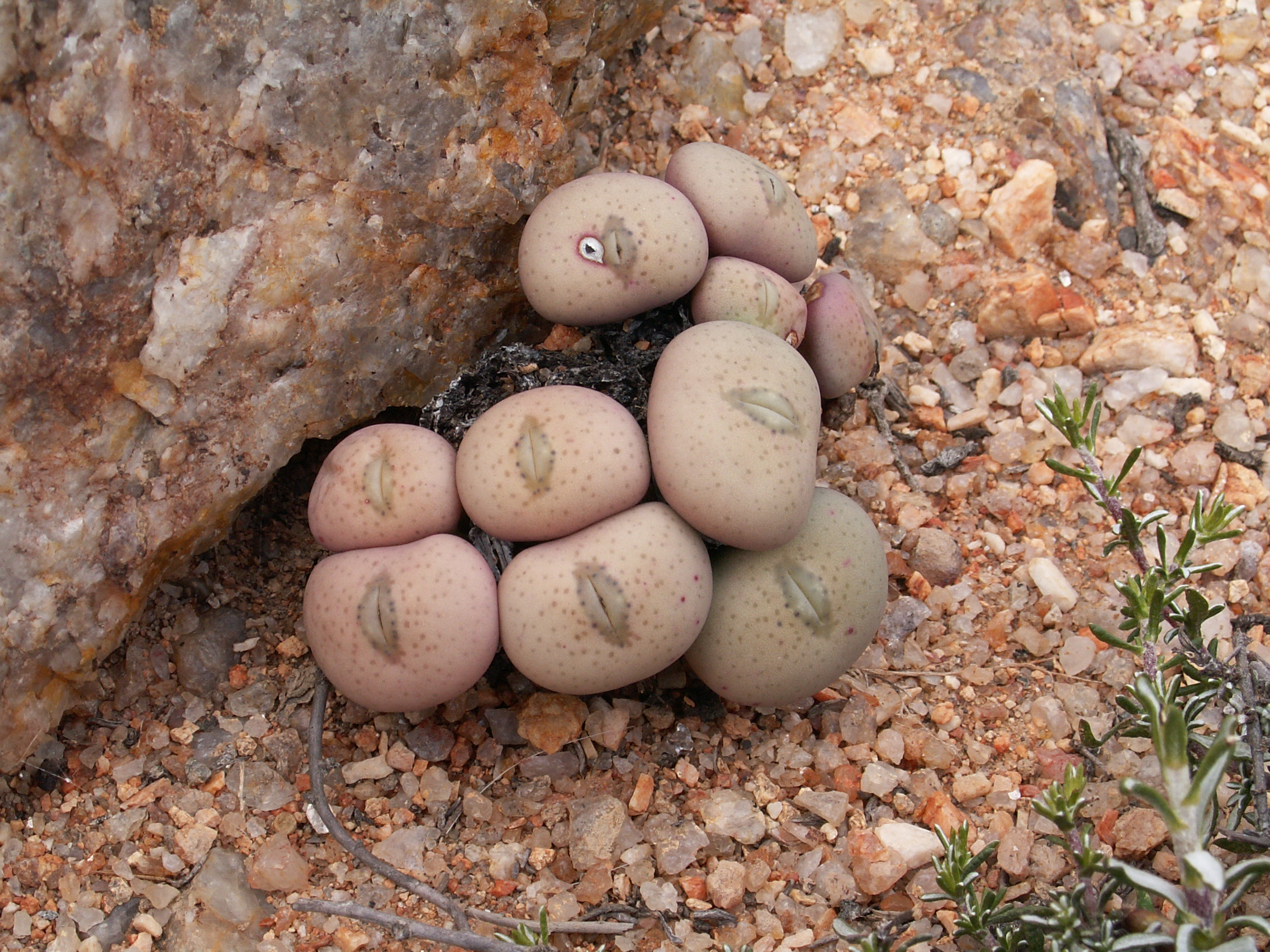 Conophytum wettsteinii (A.Berger) ., Richtersveld, Nordkap, Südafrika